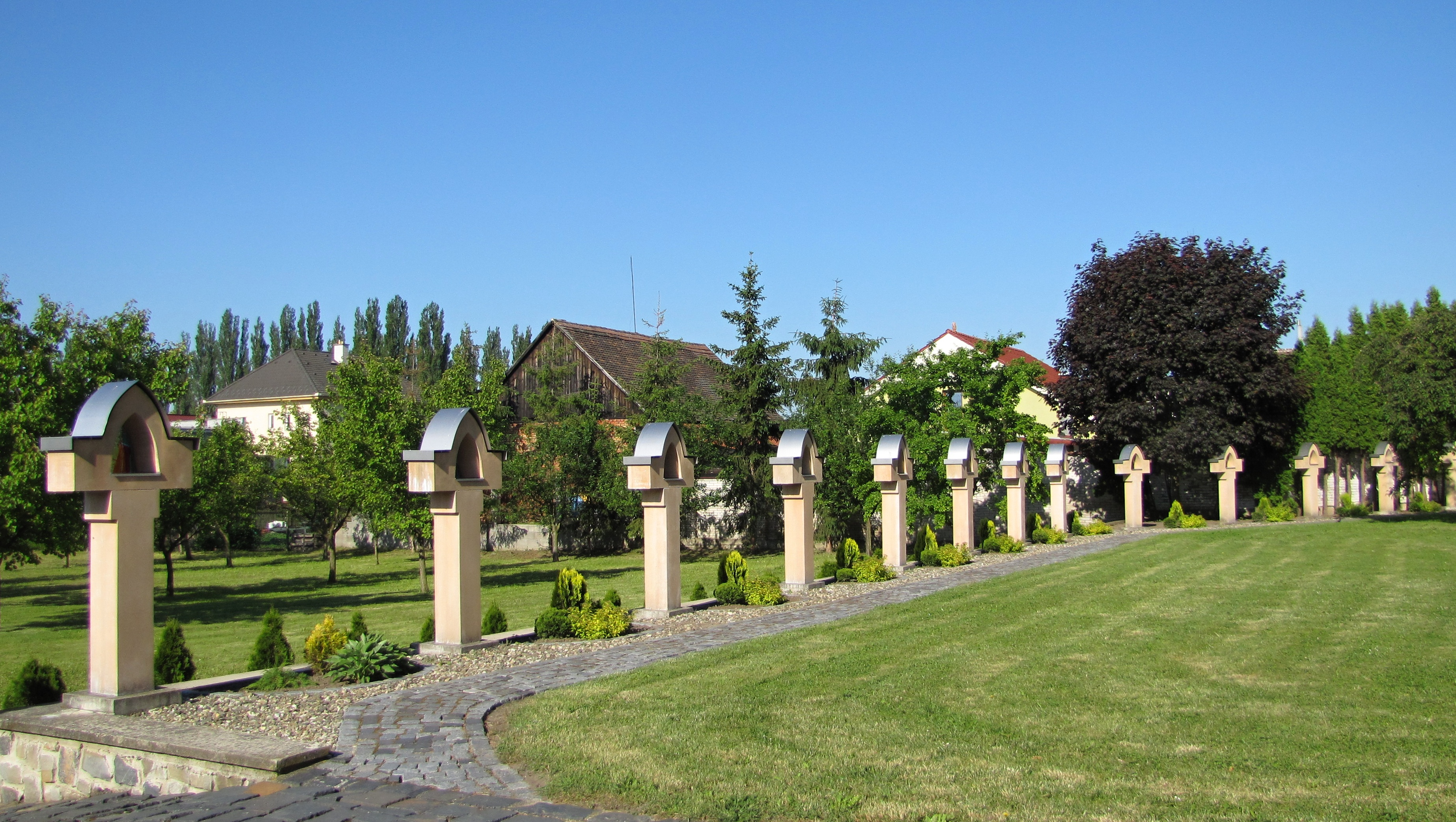 Křížová cesta u kostela svatého Vavřince ve Vracově z let 2003–2004